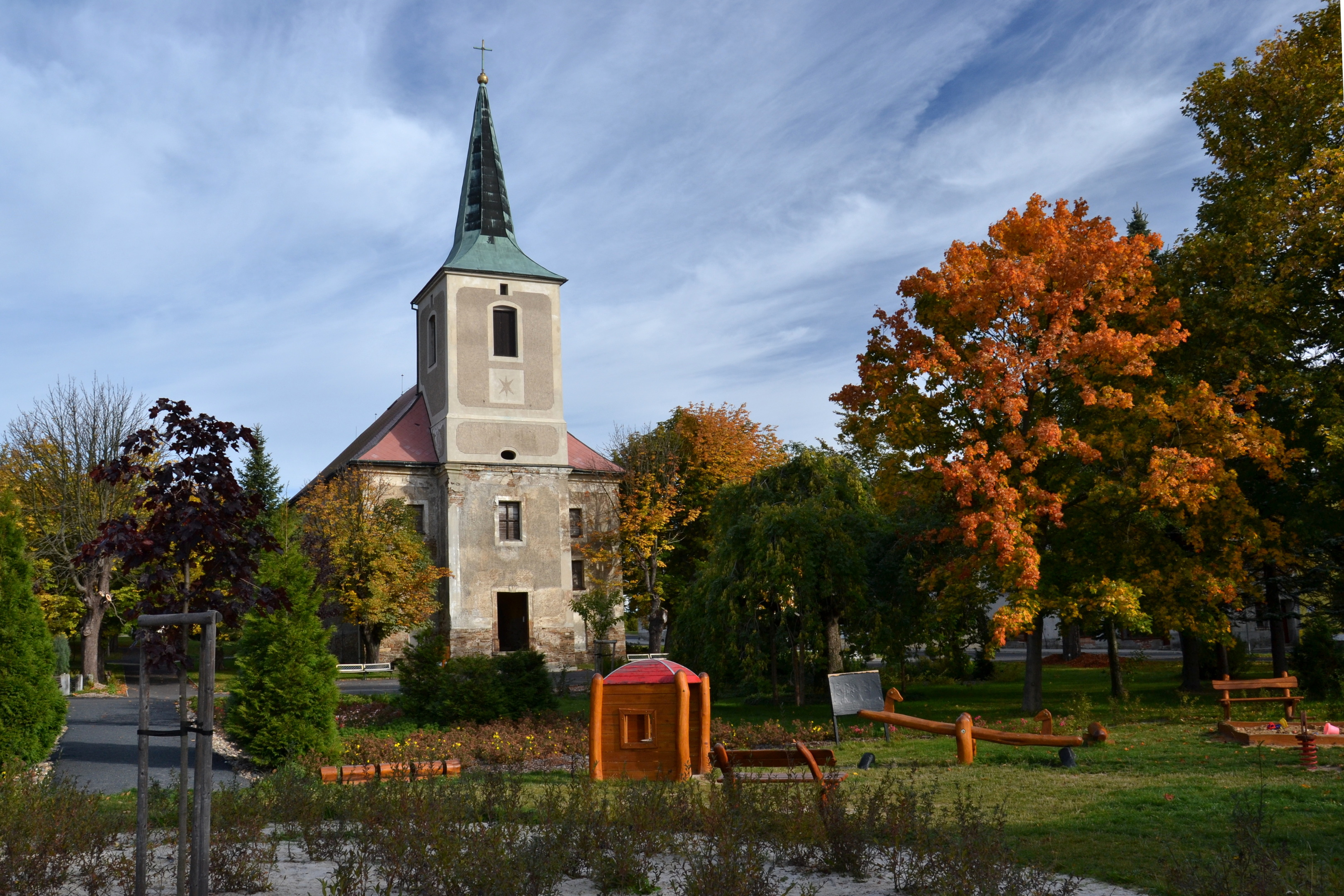 Kostel Narození P. Marie (Měděnec), Náměstí, Měděnec